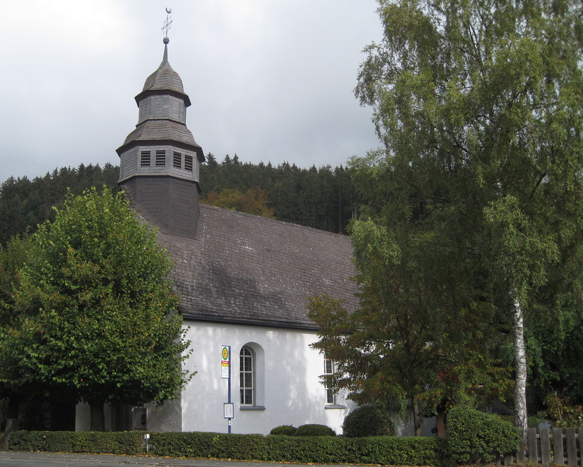 Alte Pfarrkirche St. Thomas in Hallenberg-Liesen, Dorfstraße 22. This image shows a heritage building in Germany, located in the North Rhine-Westphalian city Hallenberg (no. A013).